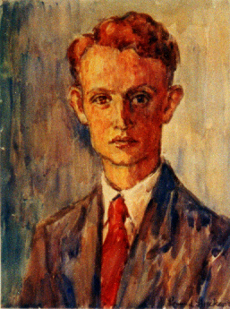 Gemälde von Sigmund Strecker: Portrait von Carl Malsch, 1947